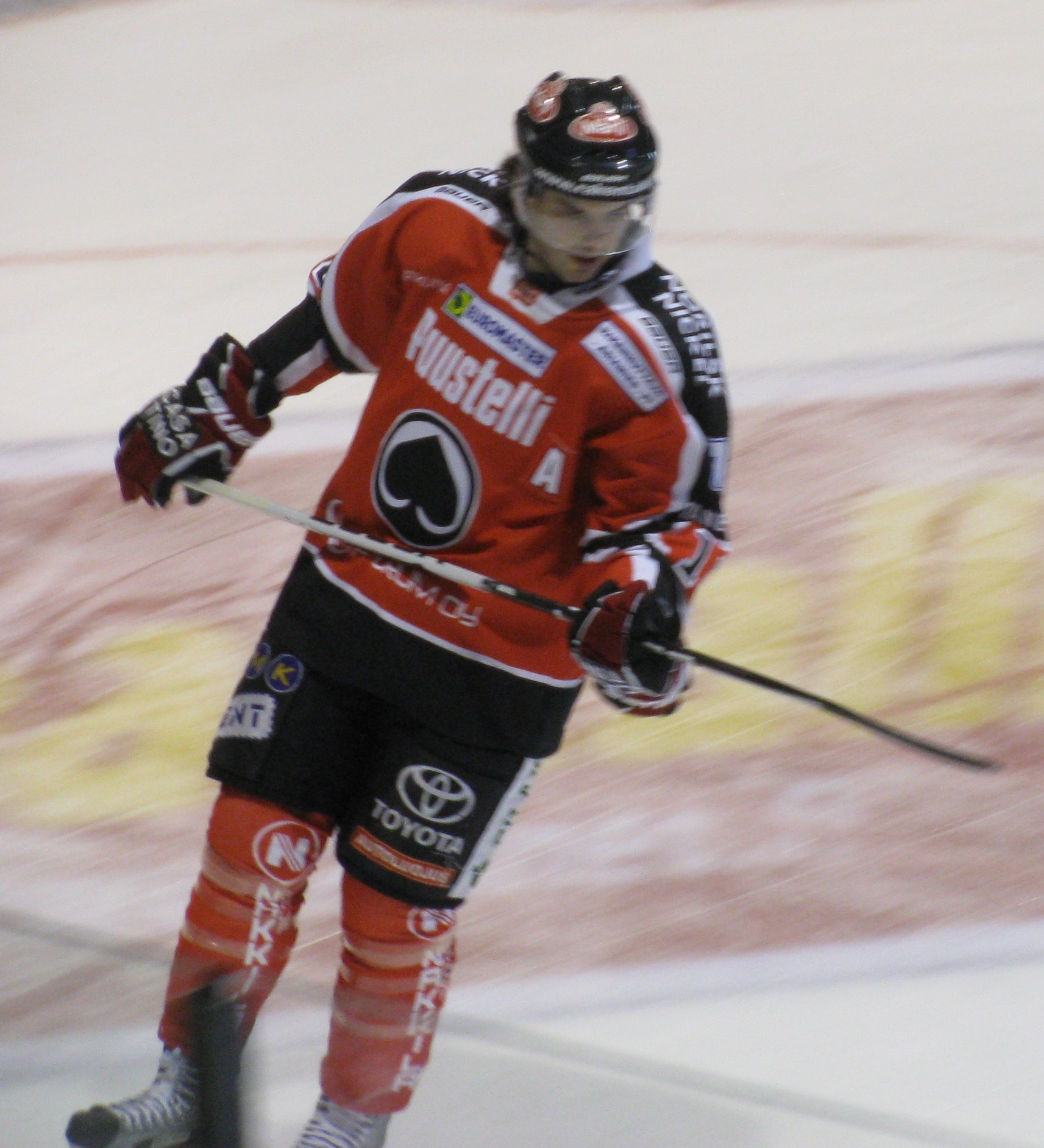 Stephen Dixon (Ässät) alkulämmittelyssä 29.12.2011 ottelussa JYPiä vastaan.